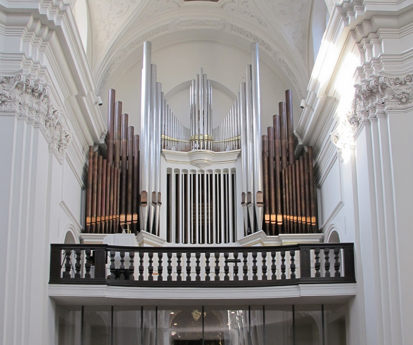 Würzburg, Neumünsterkirche, Orgel